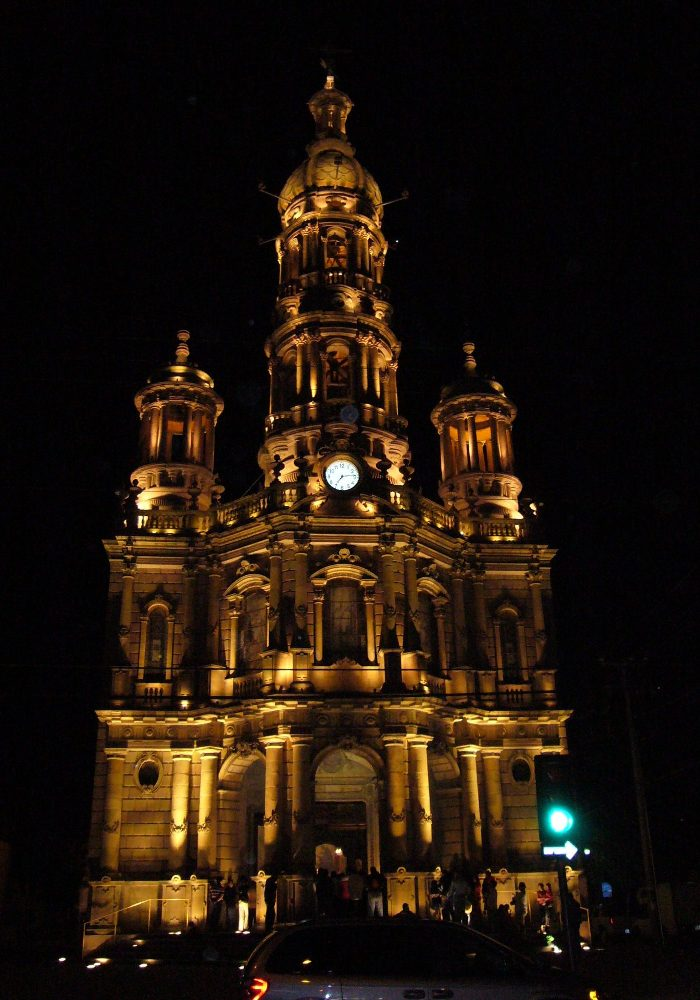 Vista nocturna del templo de San Antonio, Ags.